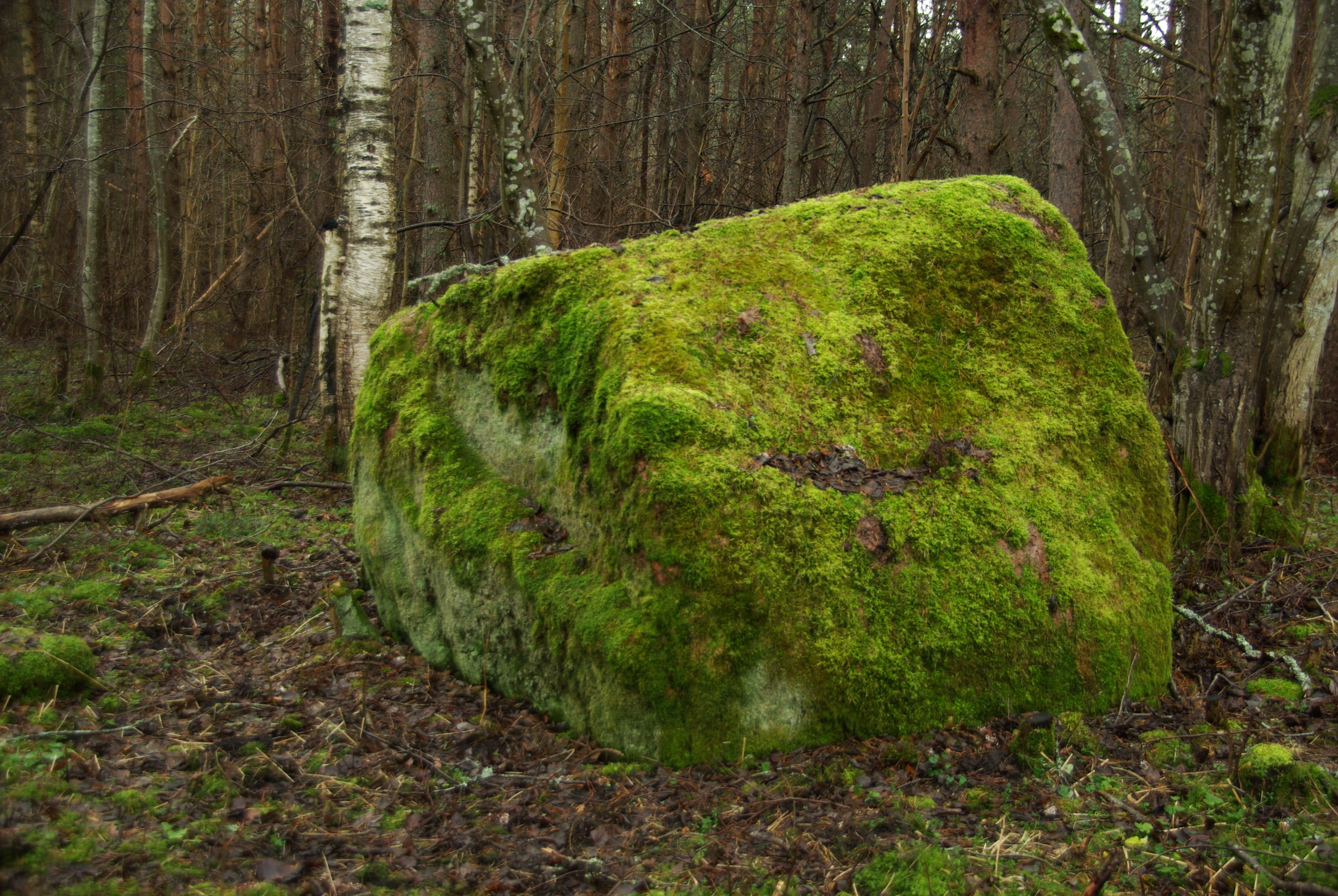 Tallinn, Nõmme-Mustamäe maastikukaitsealal, Kuusiku parkmetsas.